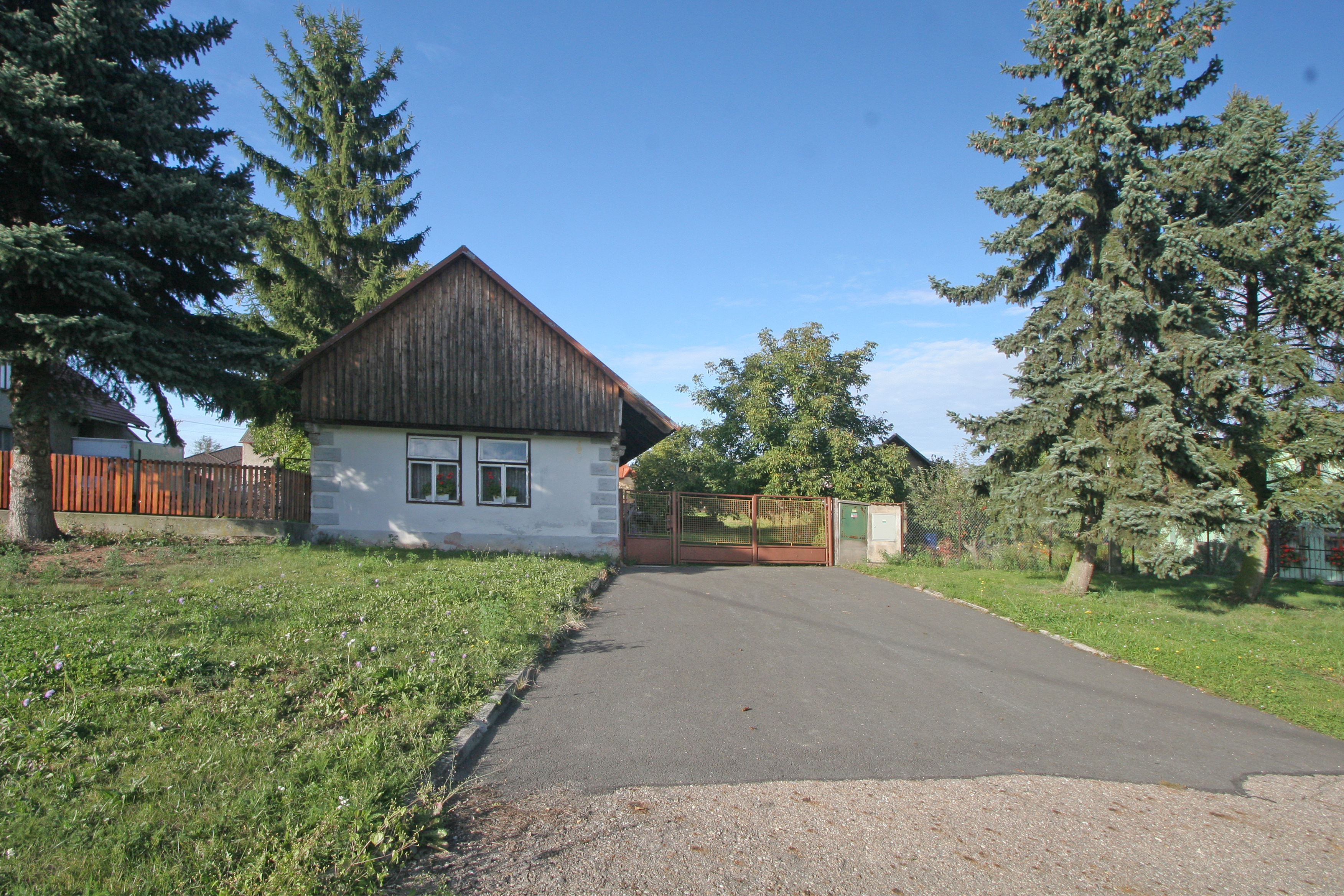 Venkovská usedlost (Kosičky), Kosičky 80